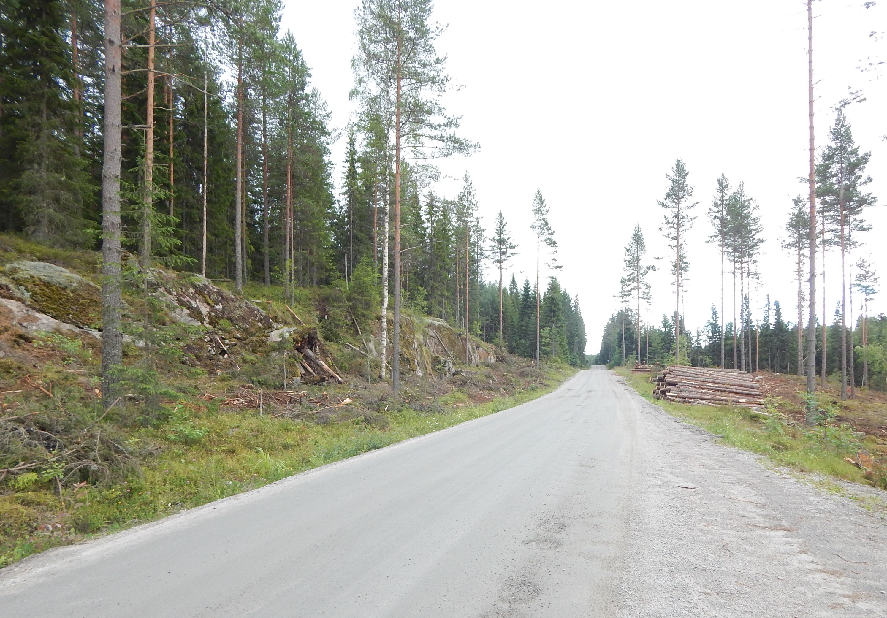 Sukkerveien (fylkesvei 241) nær vestenden ved fylkesvei 21